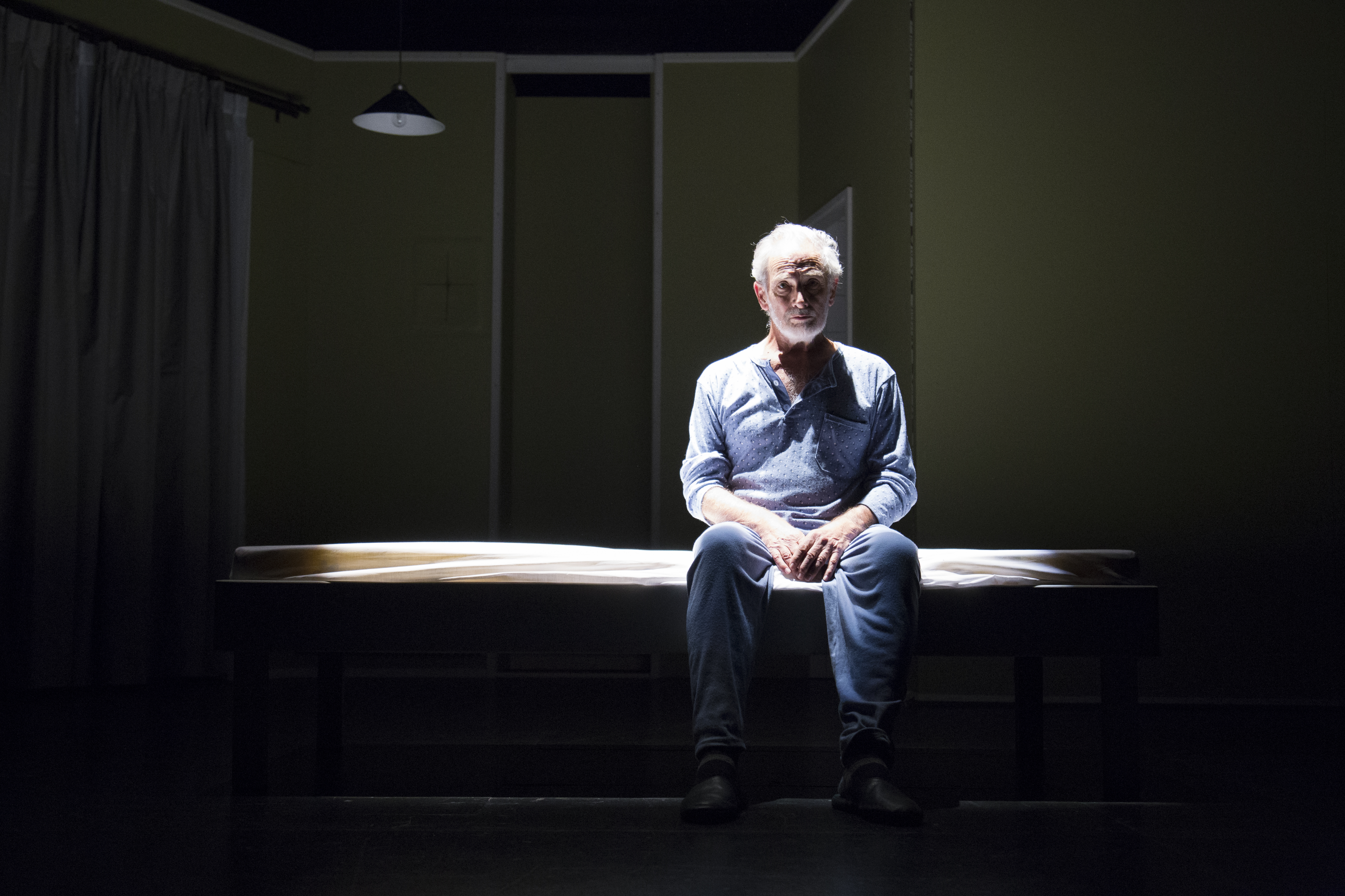 Una exitosa temporada tuvo “El Padre”, obra protagonizada por Héctor Noguera, que se presentó en el Teuc. Fotografía: Karina Fuenzalida.